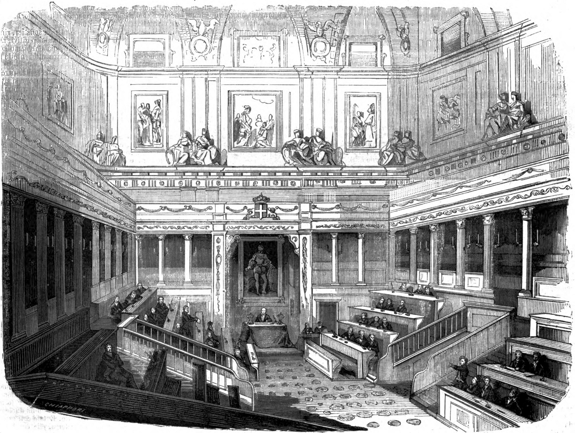 Camera dei Senatori nel Palazzo Madama in Torino